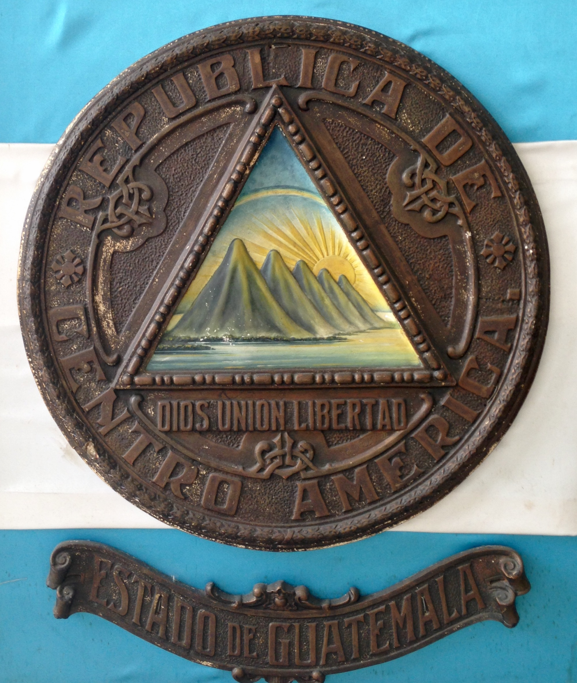 Escudo del Estado de Guatemala en 1823.